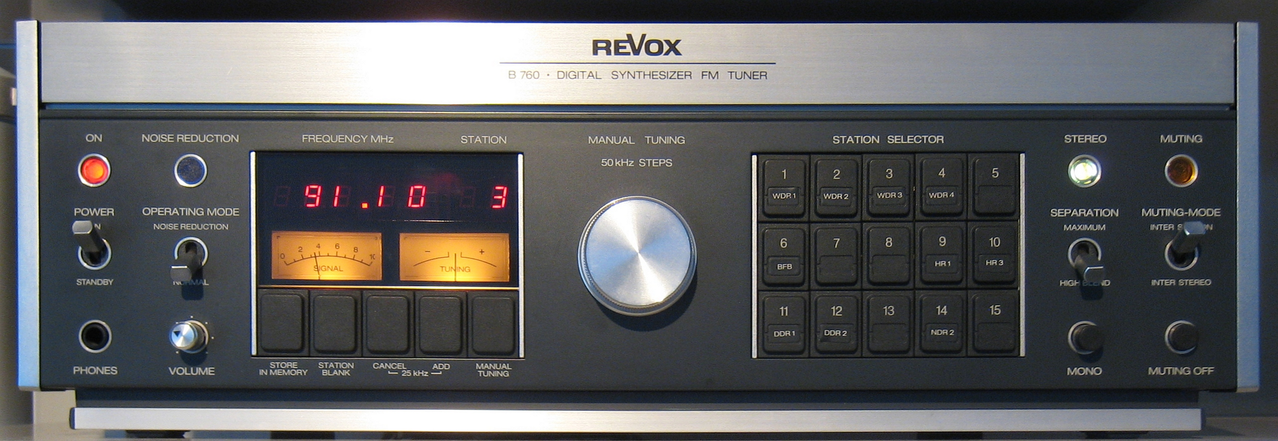 Revox audio equipment